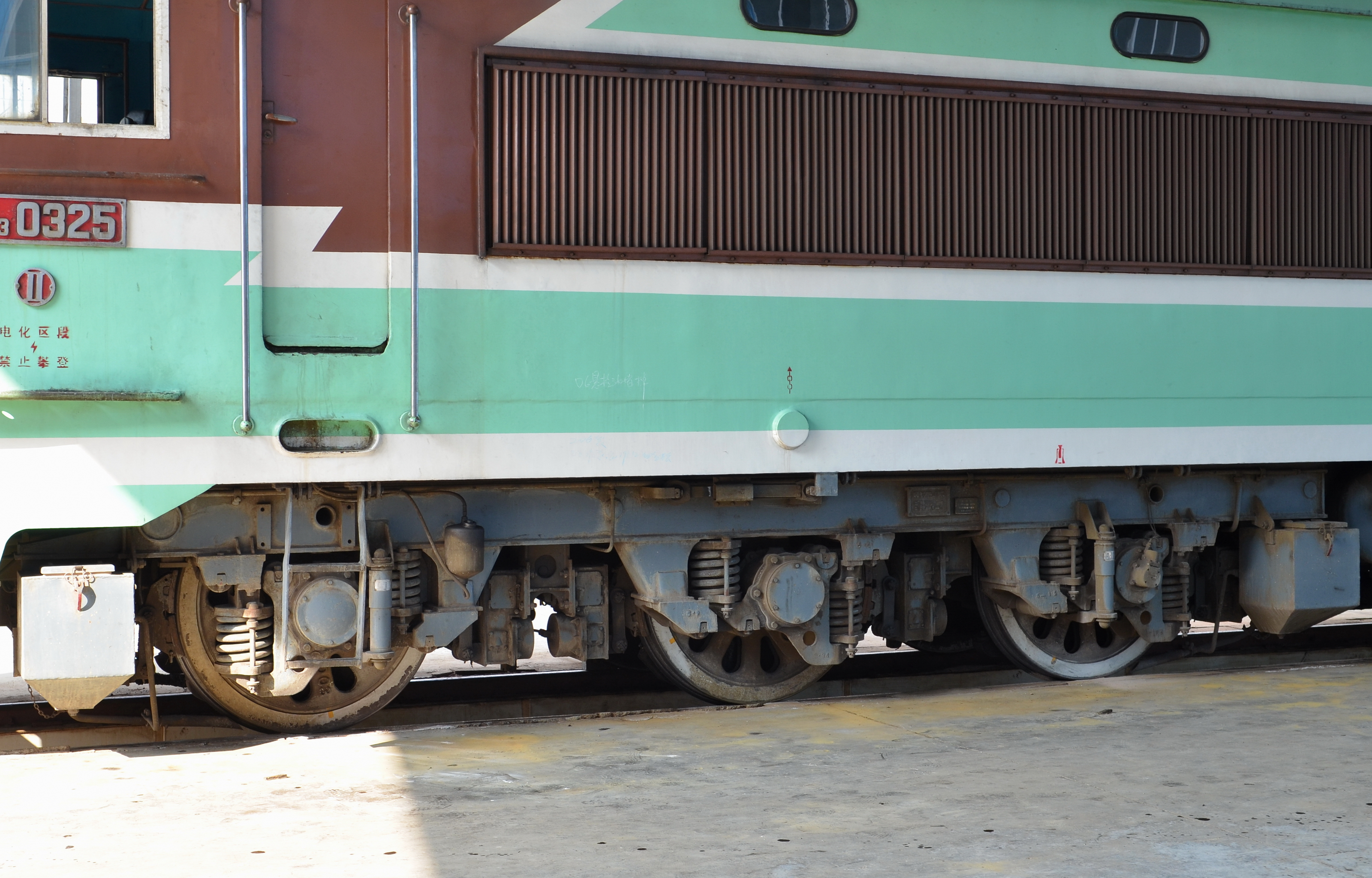 SS3型0325号车 转向架